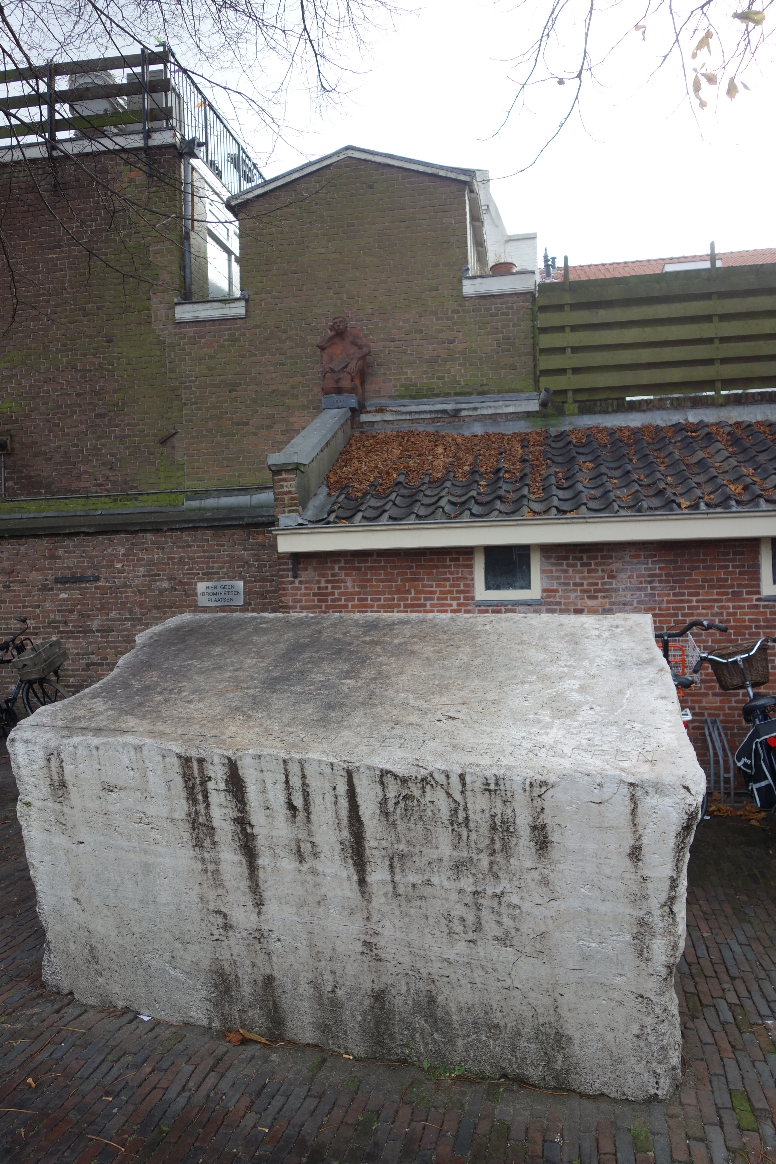 Op het terrein van de bibliotheek aan de Gasthuisstraat in Haarlem is dit kunstwerk van Bernd Lohaus geplaatst.Inscripitie bovenzijde: ZICH ZELF GETROFFEN(zie